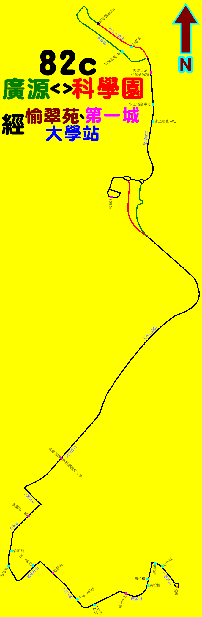 中文（香港）: 九巴82C線的走線圖